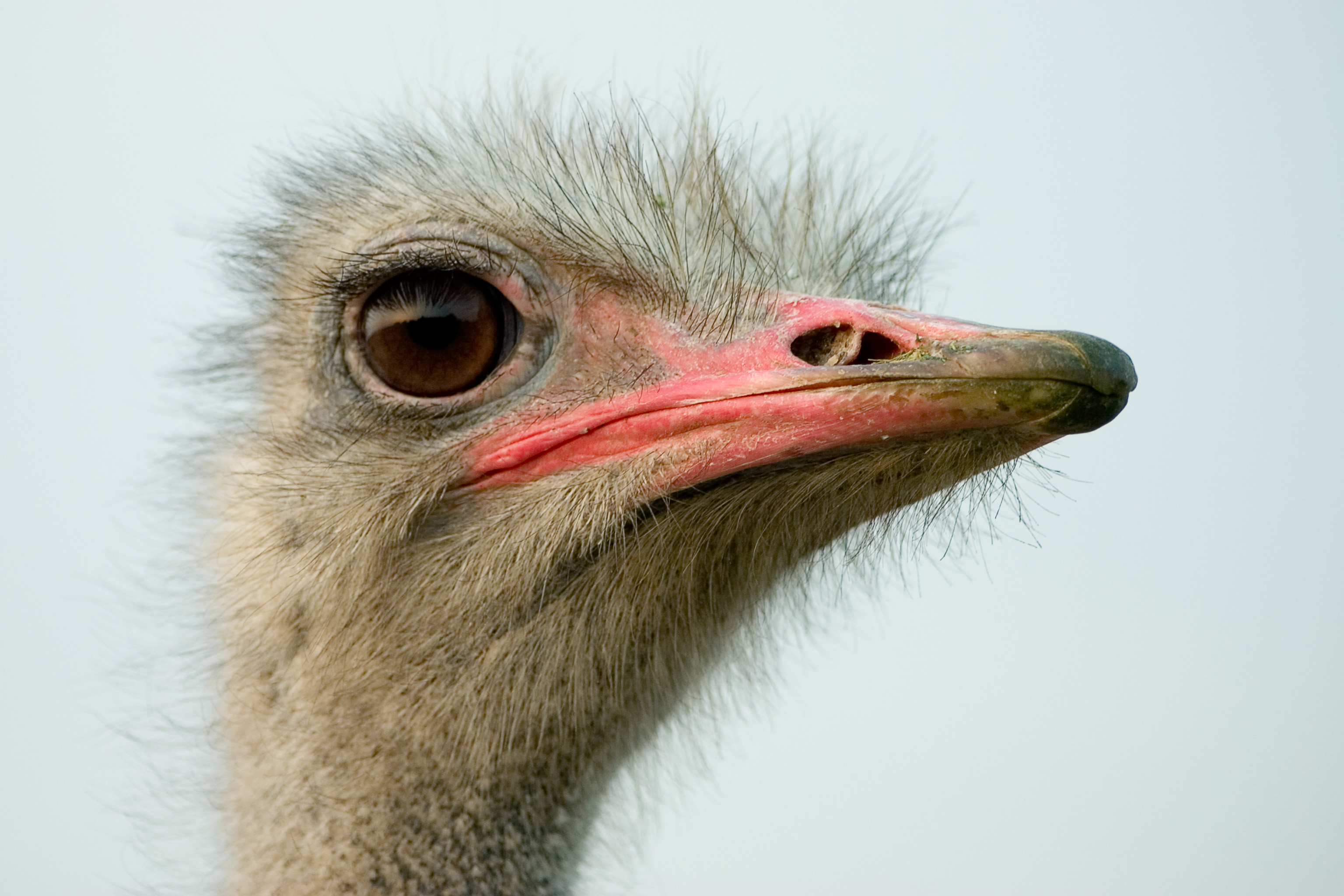 Portrait eines afrikanischen Straßes